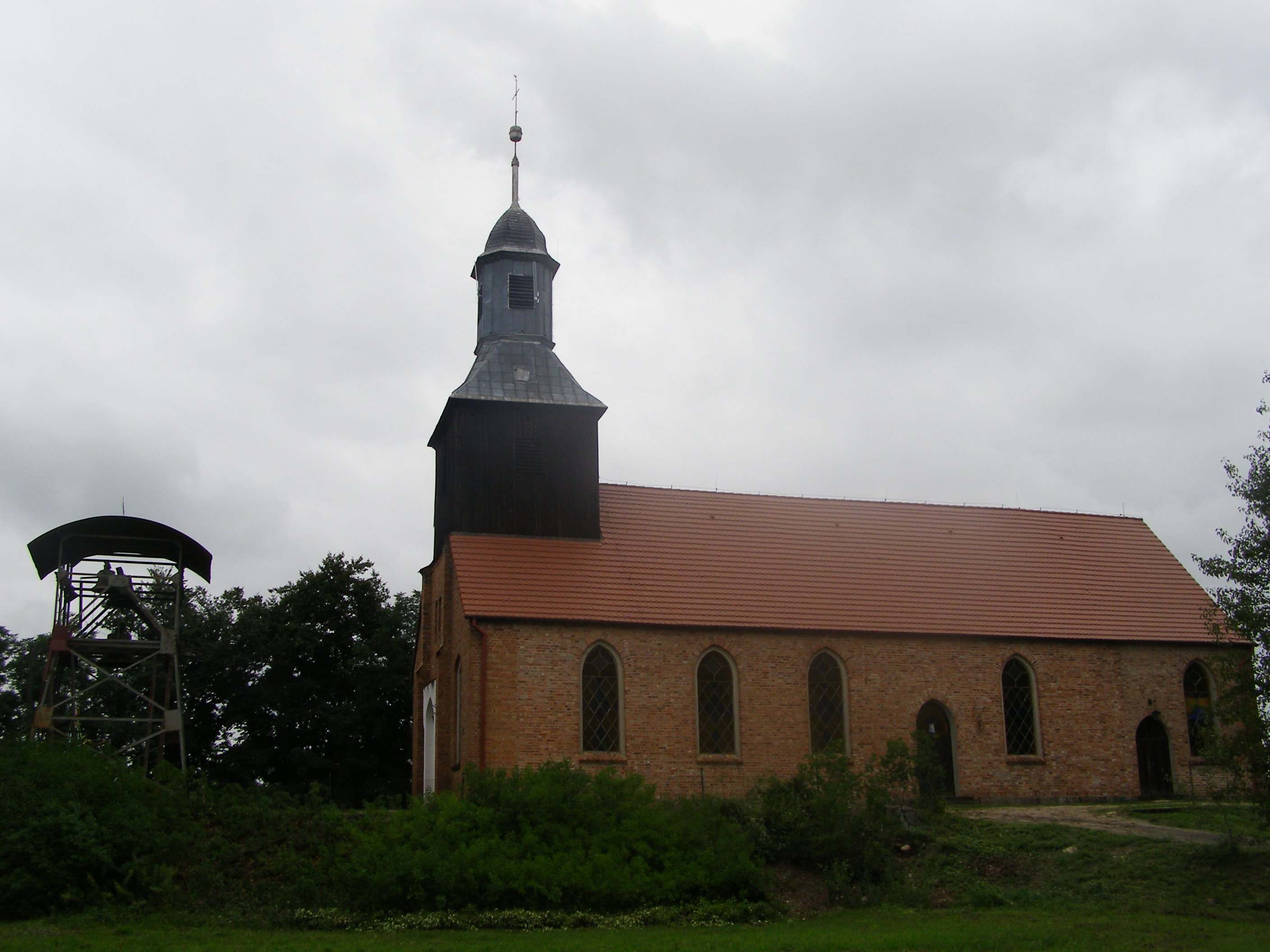 Gościmiec - dawny kościół ewangelicki, ob. rzymskokatolicki filialny p.w. Narodzenia NMP, 1 poł. XIX